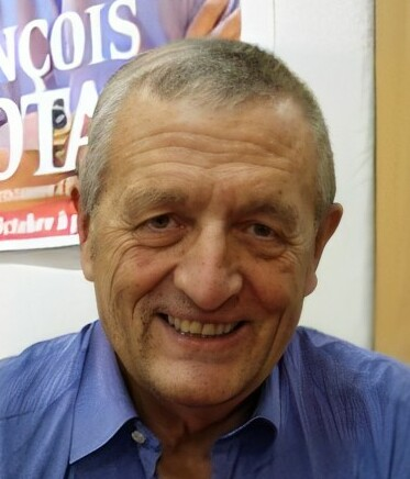 François Léotard en dédicace à Toulon, à la librairie Charlemagne.